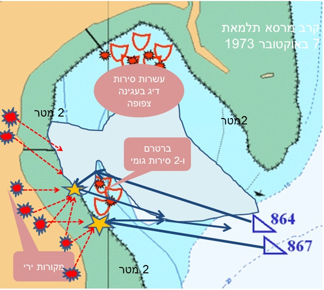 כניסת הדבורים ללמרסא תלמאת לחימה נגיעה בחוף ויציאתם.